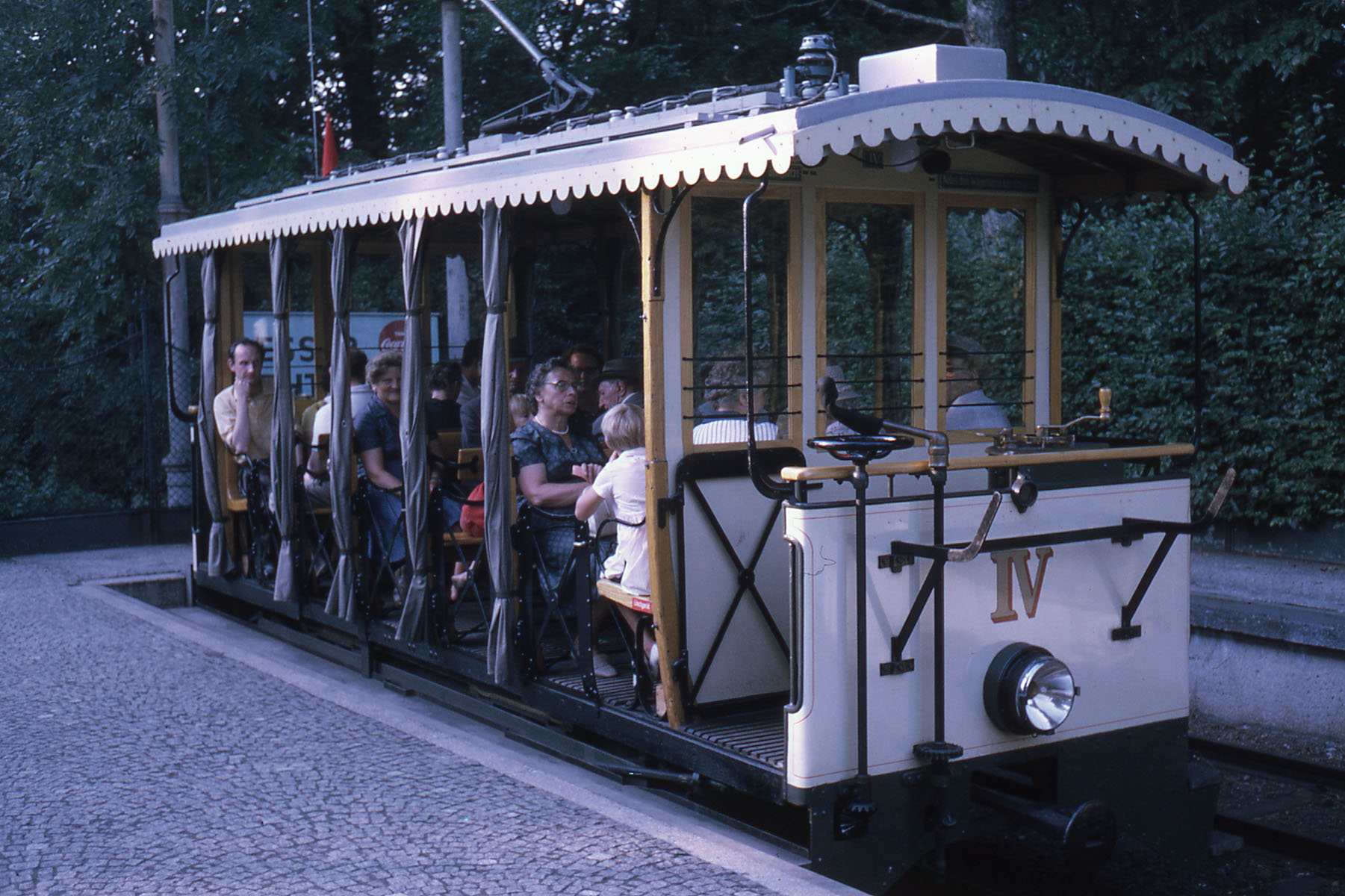 Pöstlingbergbahn, Sommertriebwagen IV in der Bergstation.